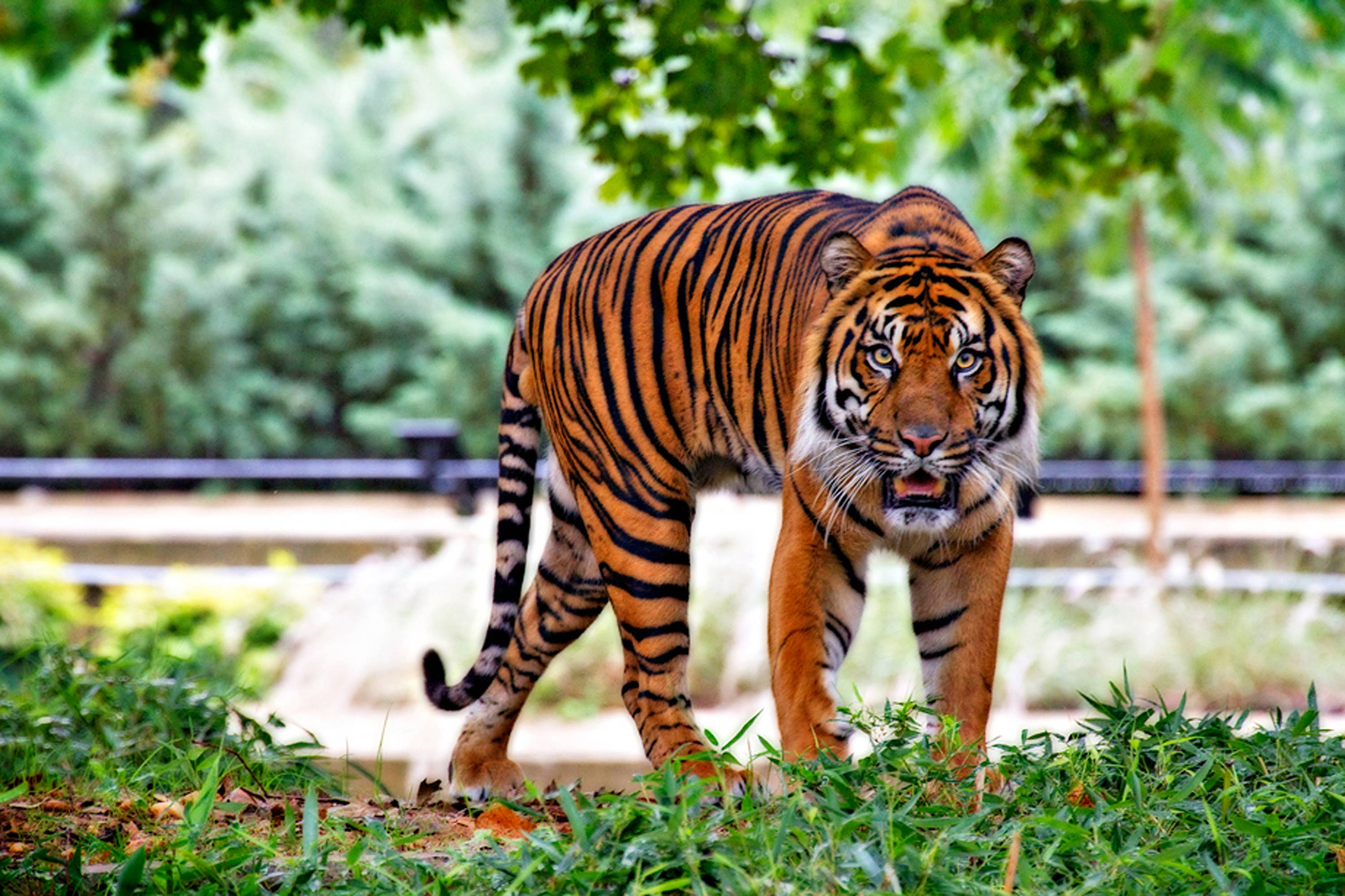 Sumatran Tiger